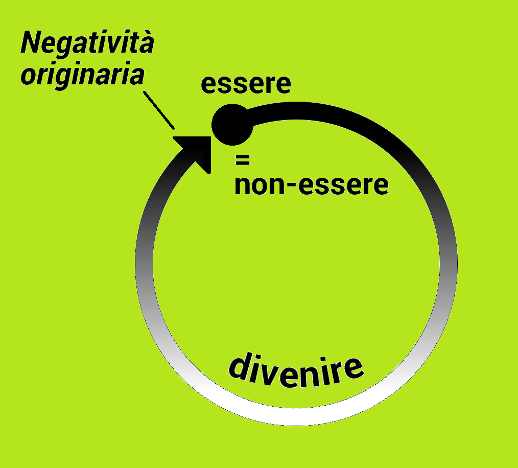 Schema della negatività originaria nell'idealismo attuale di Giovanni Gentile, che la raffigura come circolo.